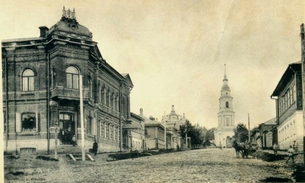 Всехсвятский кафедральный собор